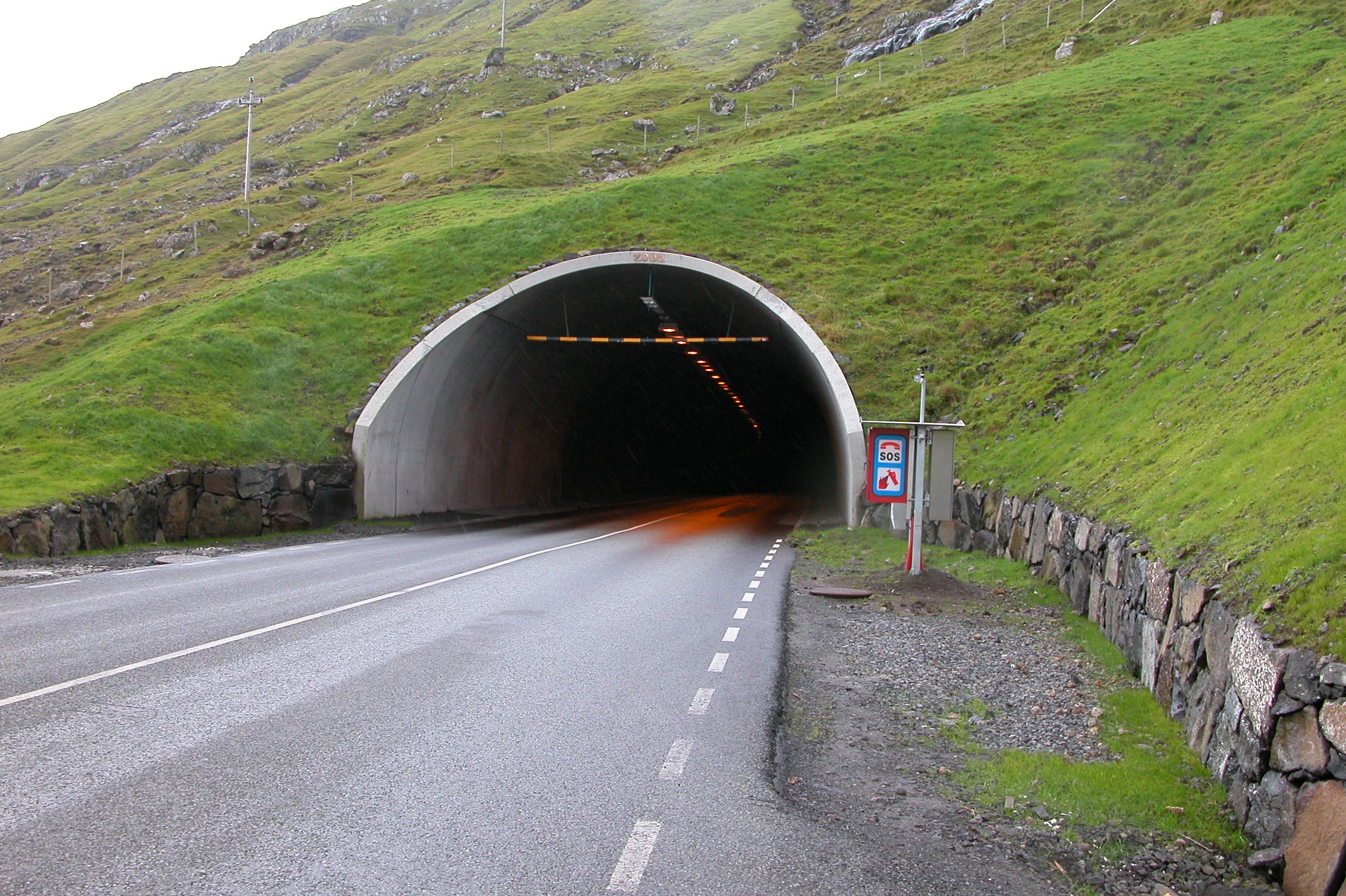 Vágatunnilin, Faroe Islands.